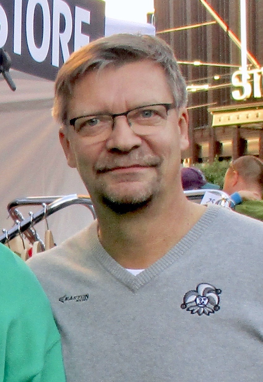 Jääkiekkovalmentaja Jukka Jalonen elokuussa 2016.